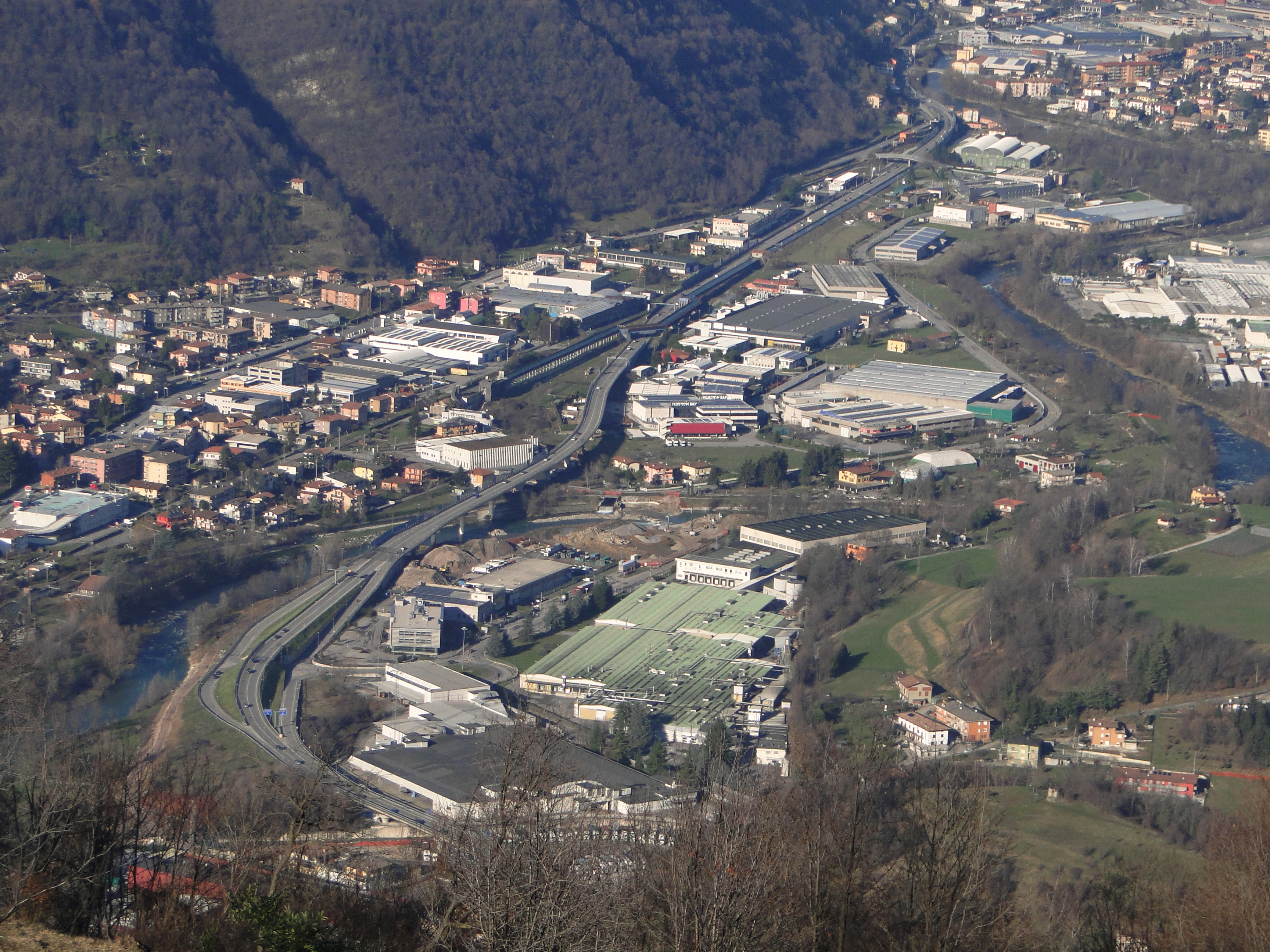 Vista su Comenduno (fraz. di Albino), Cene, con il fiume Serio e la S.S. 671